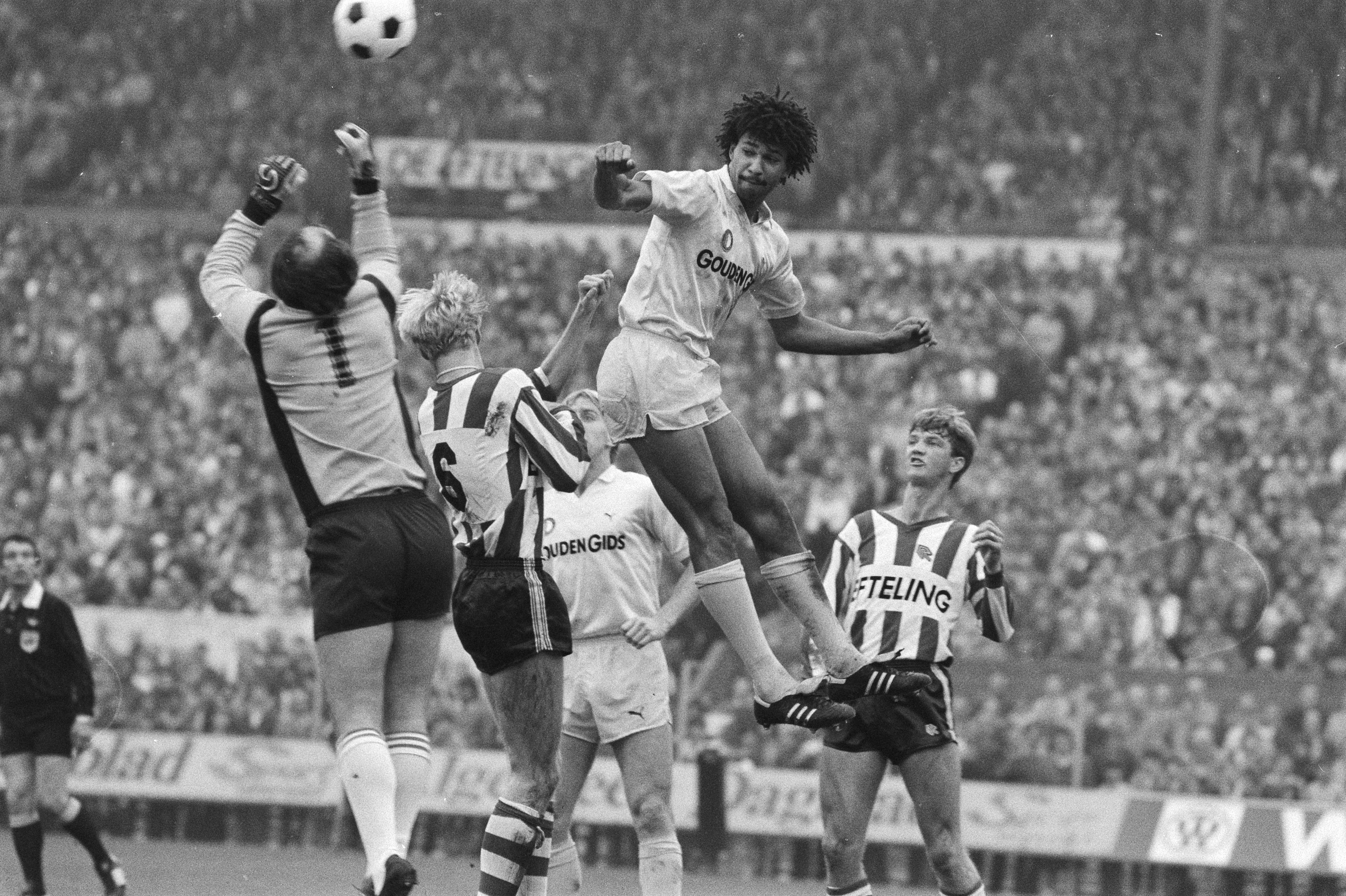 Sparta-Feyenoord, 1-4. Van links naar rechts: scheidsrechter Bep Thomas, Sparta-keeper Bas van Noortwijk, Ron van den Berg (6), André Hoekstra, Ruud Gullit (Feyenoord), Louis van Gaal (Sparta). Datum 6 november 1983. Locatie: Het Kasteel, Rotterdam, Zuid-Holland